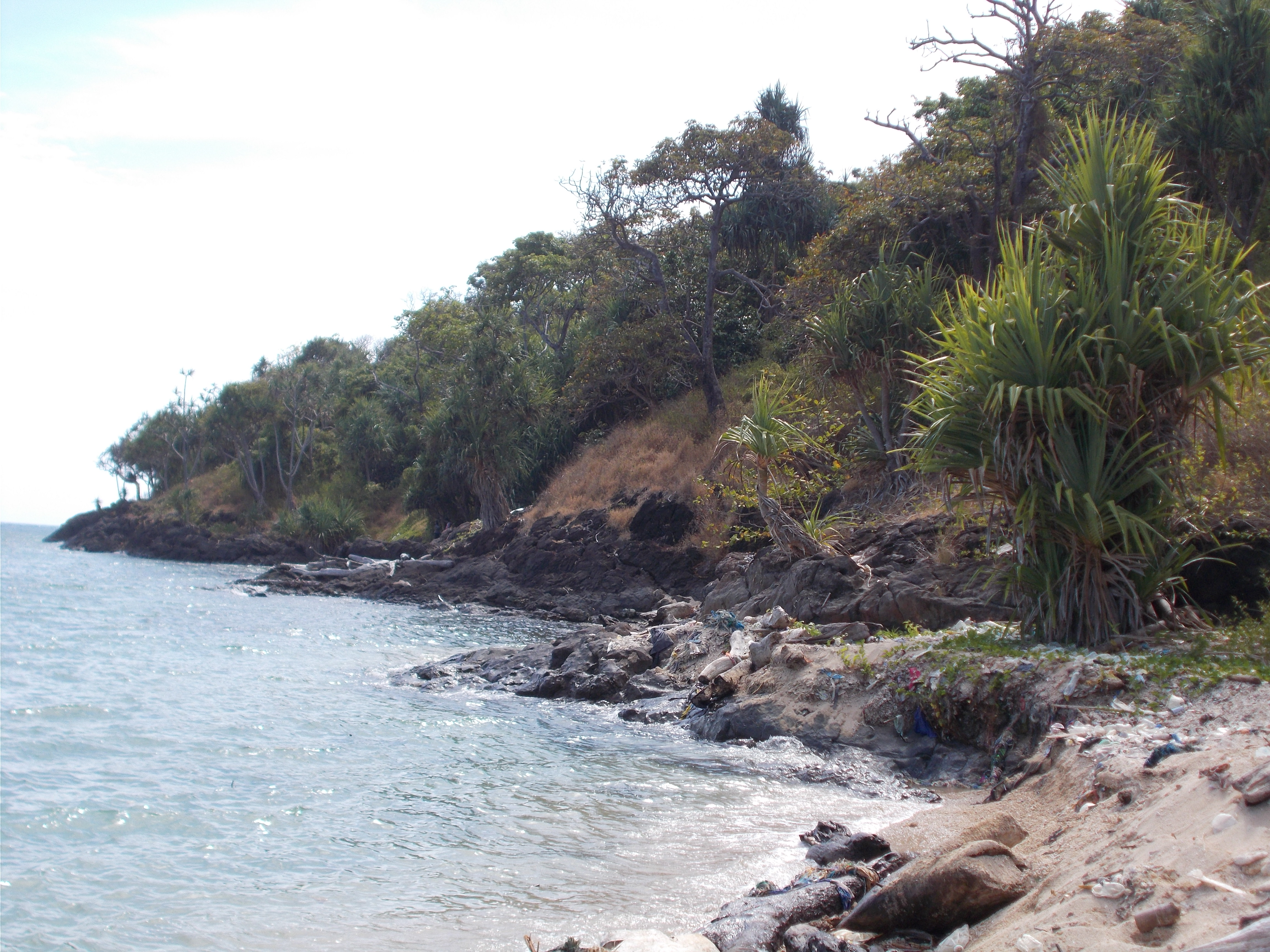 Pantai Tanjung Maradapan